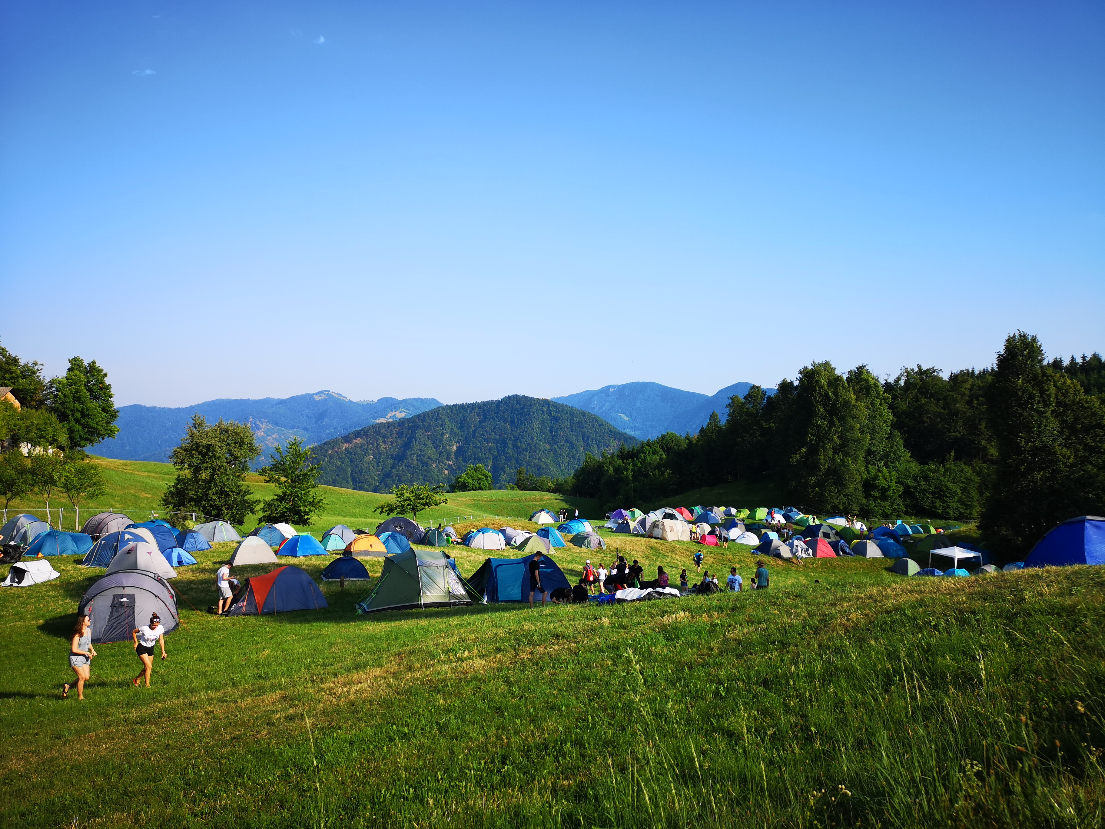 Na sliki vidimo kamp, ki je postavljen ob festivalskem prizorišču, kjer obiskovalci postavijo svoje šotore, v katerih prebivajo za čas festivala.